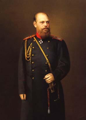 13-й Імператор Всеросійський